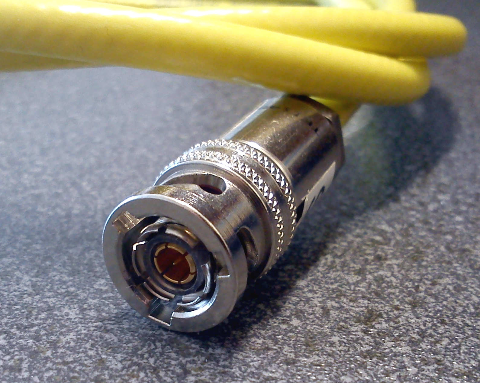 BNC Triax connector with a cable